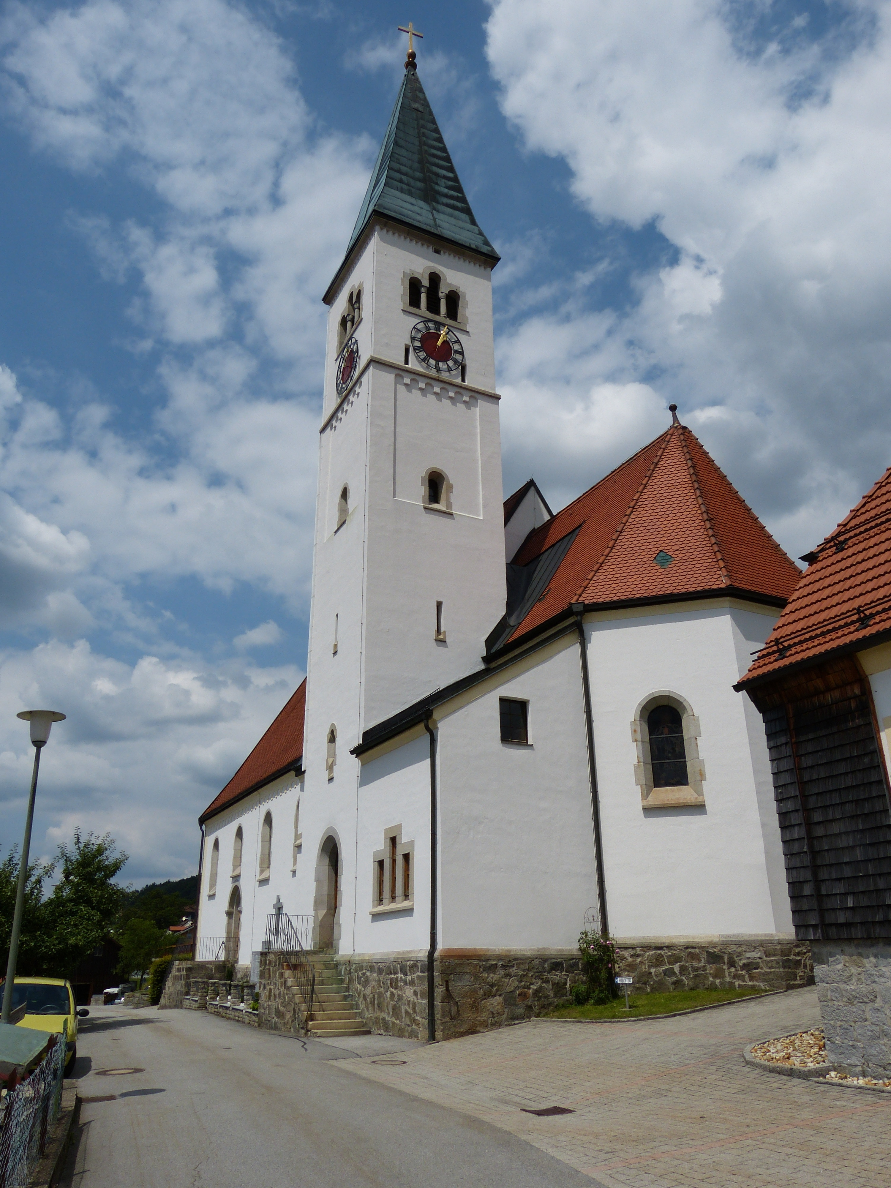 Wildenranna ( Wegscheid / Lower Bavaria ). Our Lady of Sorrows parish church ( 1906 )